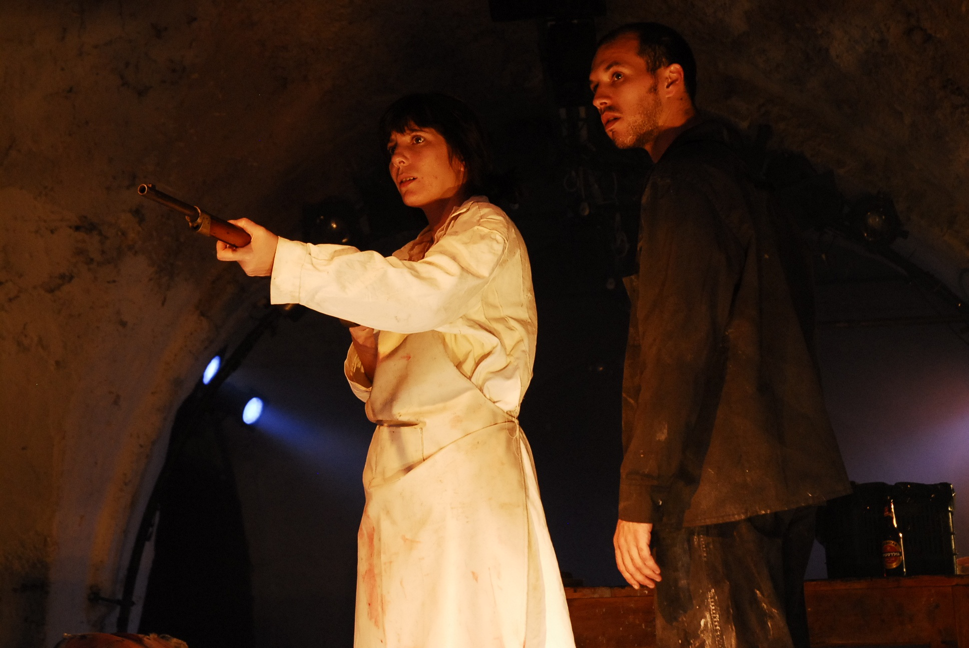 "עניין של גברים" שעלתה בתיאטרון הערבי עברי ביפו בבימויה של עמית זרקא